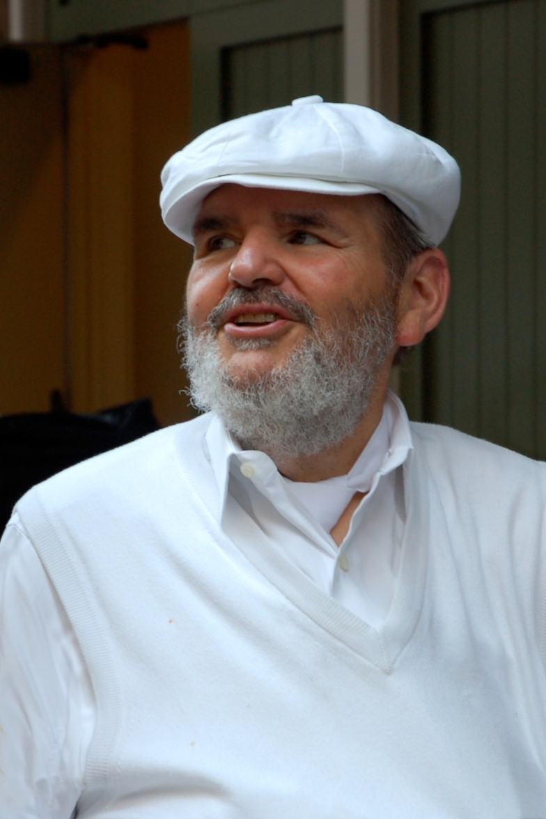 Chef Paul Prudhomme